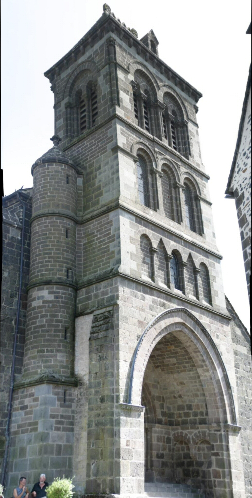 Eglise Saint Matthieu de Salers